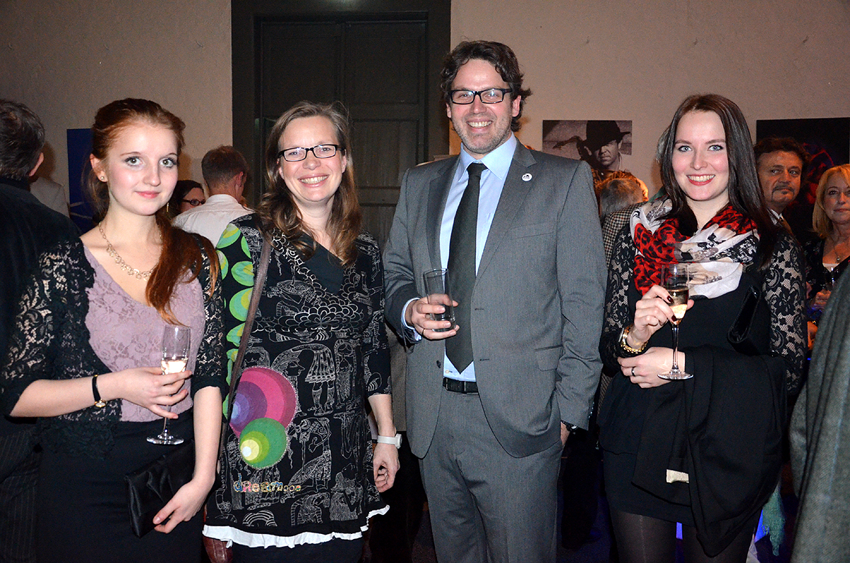 Zur den Feierlichkeiten der Verleihung des Stadtkulturpreises und des Sonderpreises für herausragendes bürgerschaftliches Engagement durch den Freundeskreis Hannover in der Orangerie des Großen Gartens in Herrenhausen erschienen zahlreiche Persönlichkeiten aus dem vielfältigen Leben rund um die niedersächsische Landeshauptstadt, hier etwa Vertreter des Vereins Politik zum Anfassen e.V. (im Vordergrund von links): Friederike Jüsten, Monika Dehmel, Gregor Dehmel und Anne Schulte ...